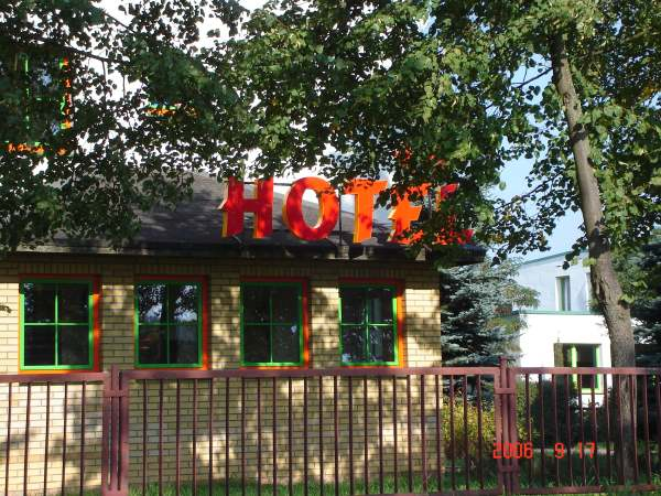 Hotel w Redle